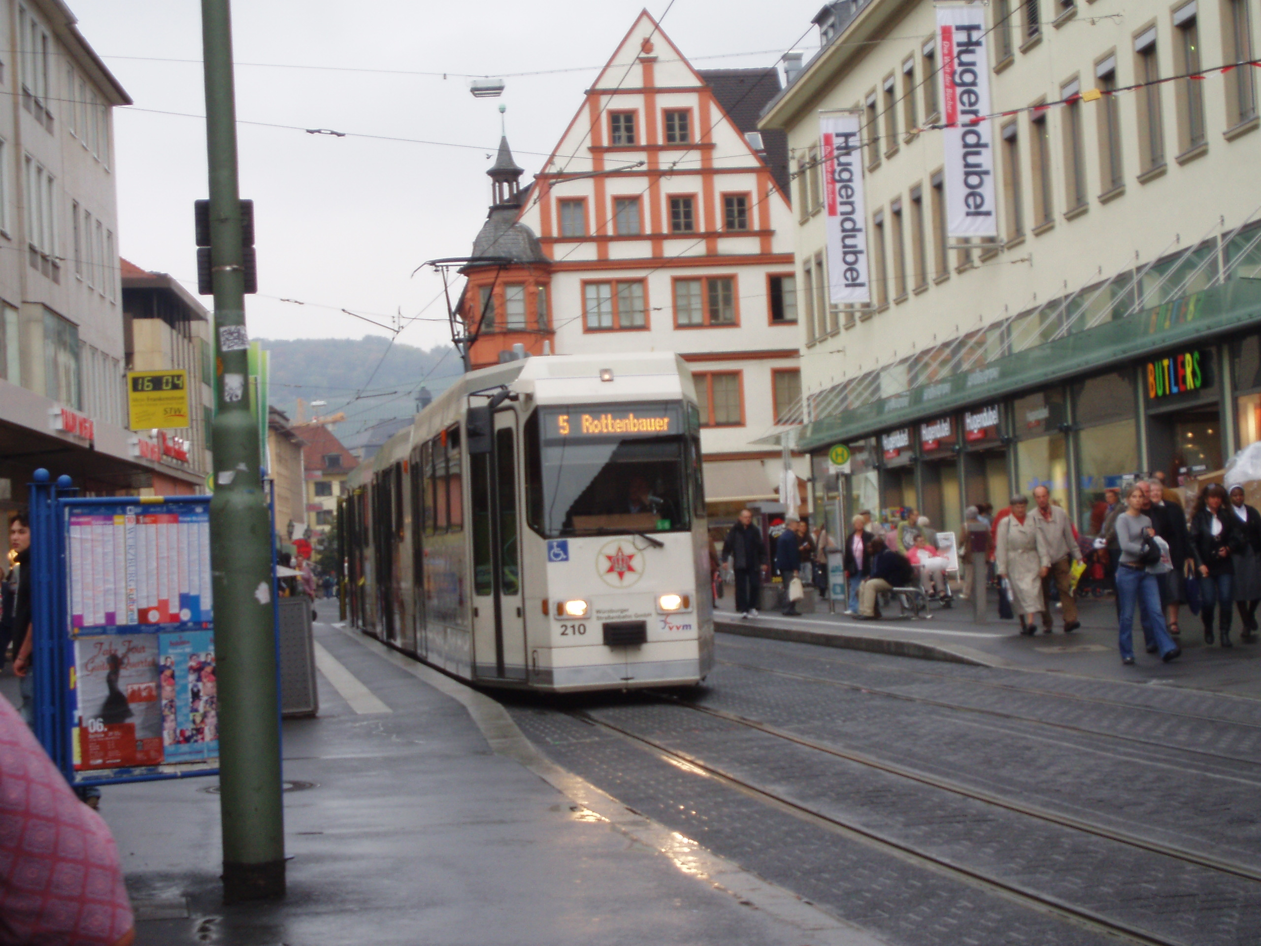 Straßenbahn in Würzburg